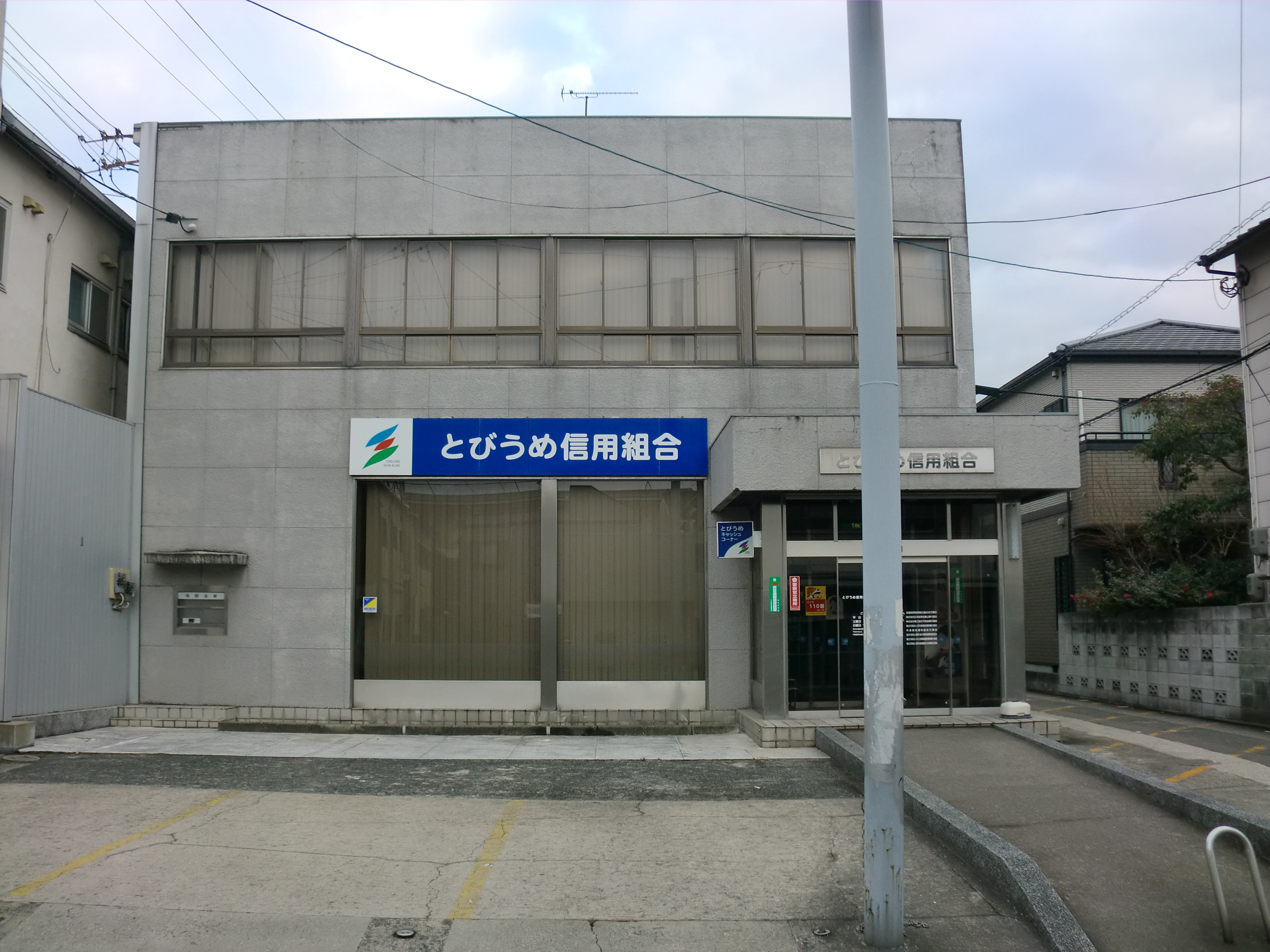 福岡市東区にあるとびうめ信用組合本店